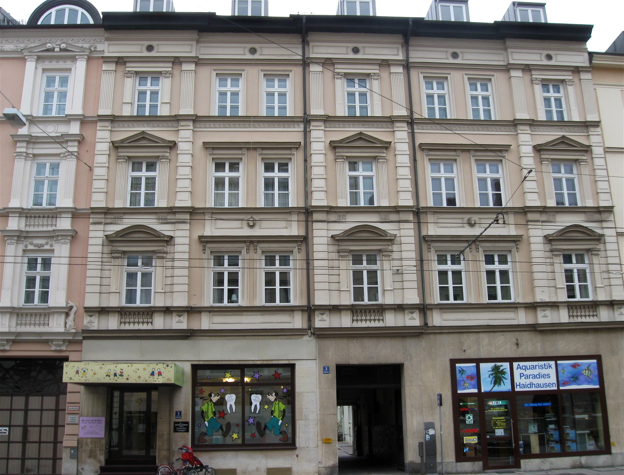 Max-Planck-Straße 3; Mietshaus, spätklassizistisch, reich gegliedert, 1877-78 von Albert Bruckmaier.